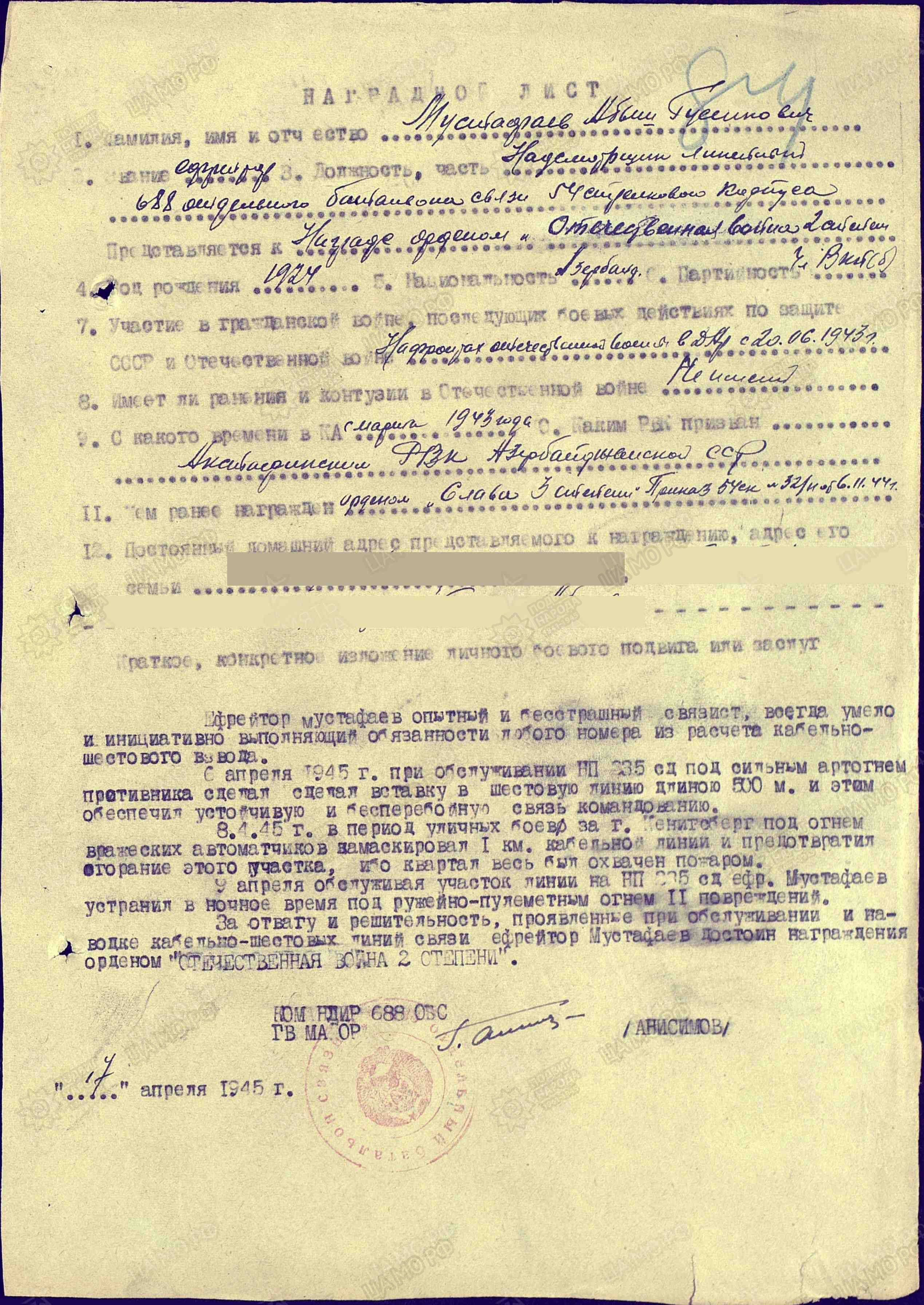 наградной лист